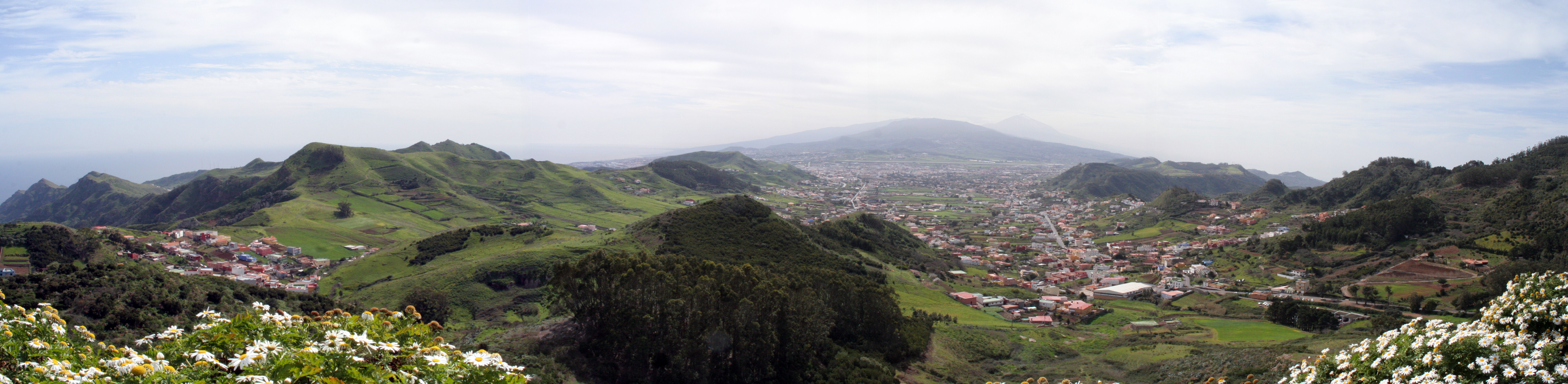 Vista desde el mirador de la Cruz del Carmen